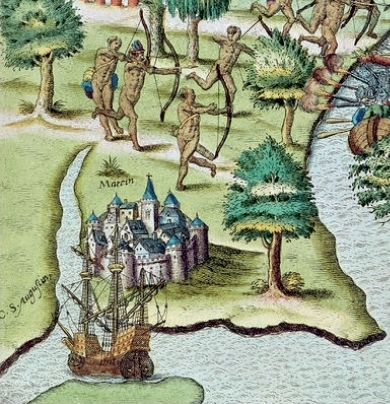 Pormenor da gravura de Theodore de Bry representando os “cercos de Igarassu” em Pernambuco no ano de 1549: Olinda. Reproduzida da edição original de 1557 em Marburgo, Alemanha, do livro de Hans Staden, Duas Viagens ao Brasil.